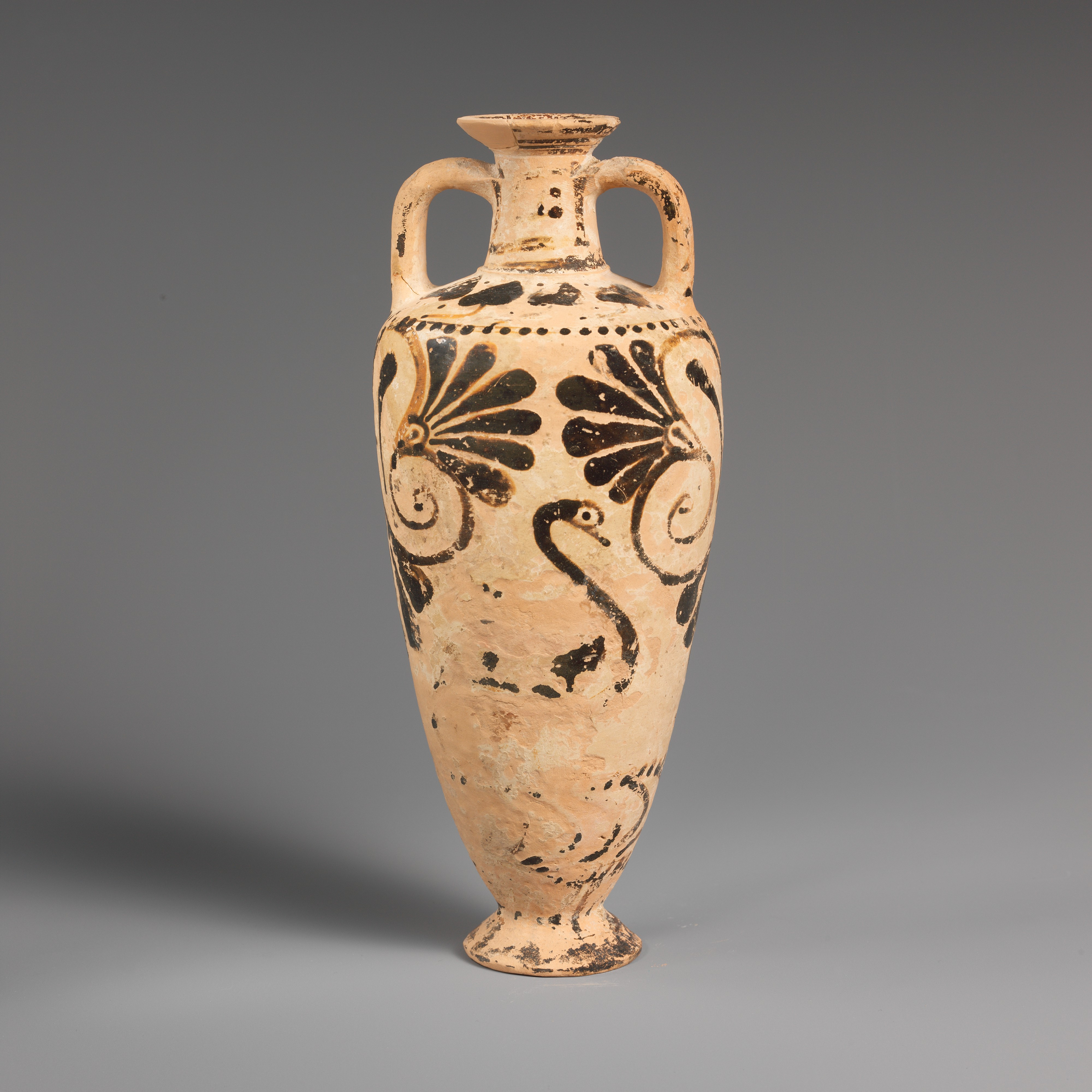 East Greek, Milesian, Fikellura; Amphoriskos; Vases; Waterbirds